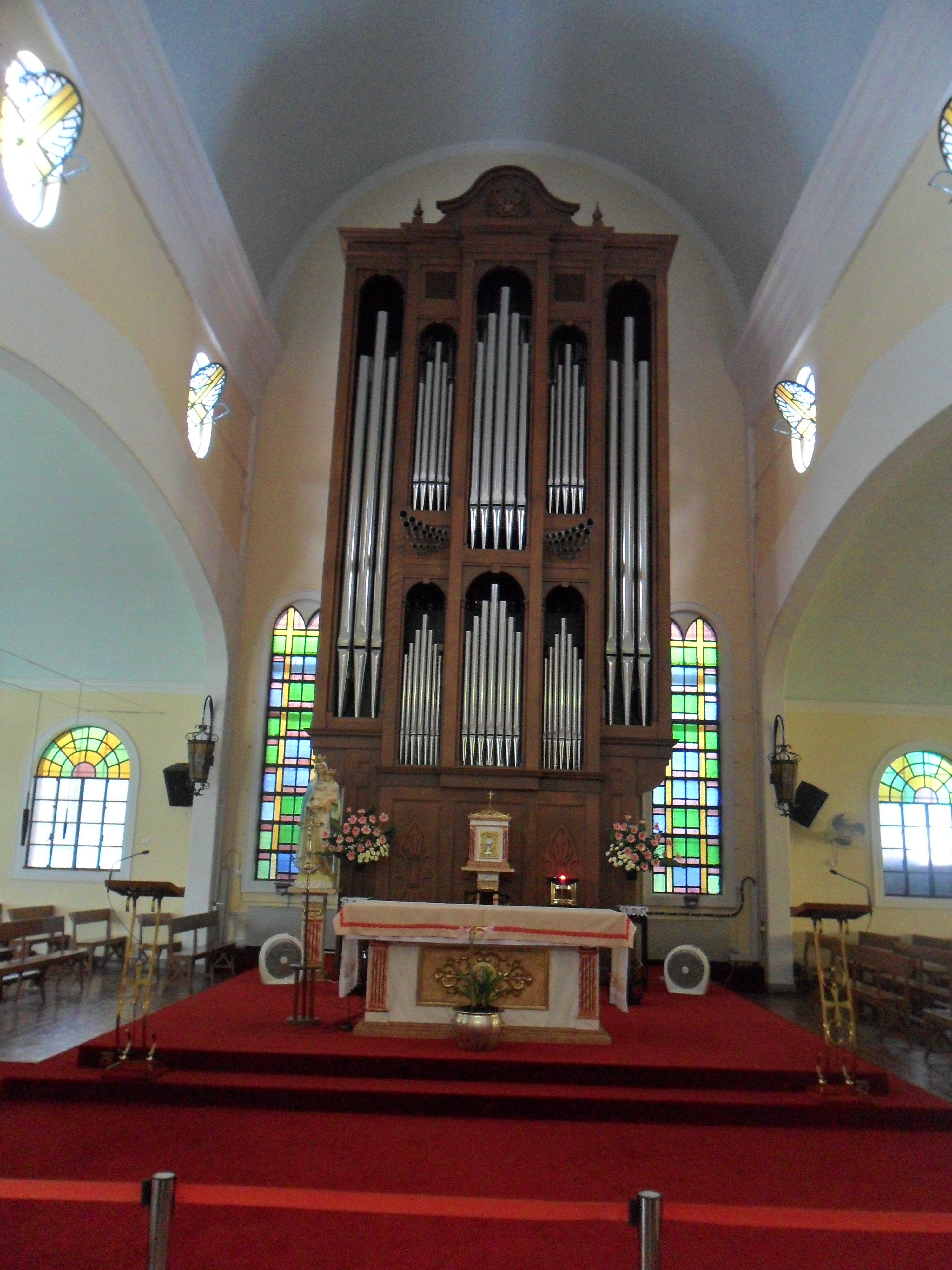 中文（香港）: 望德聖母堂, 澳門, 中國